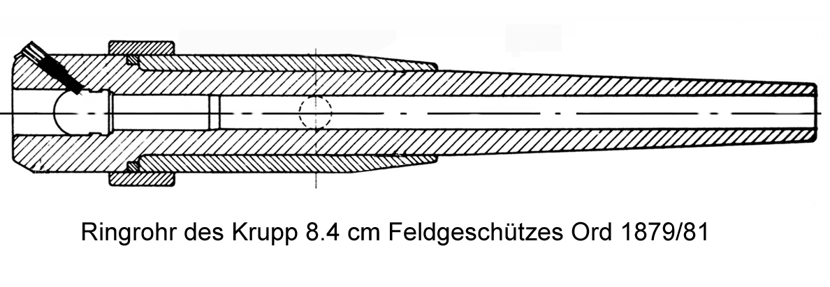 Geschütz-Ringrohr